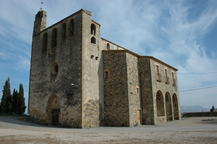 Sant Joan de Foixà